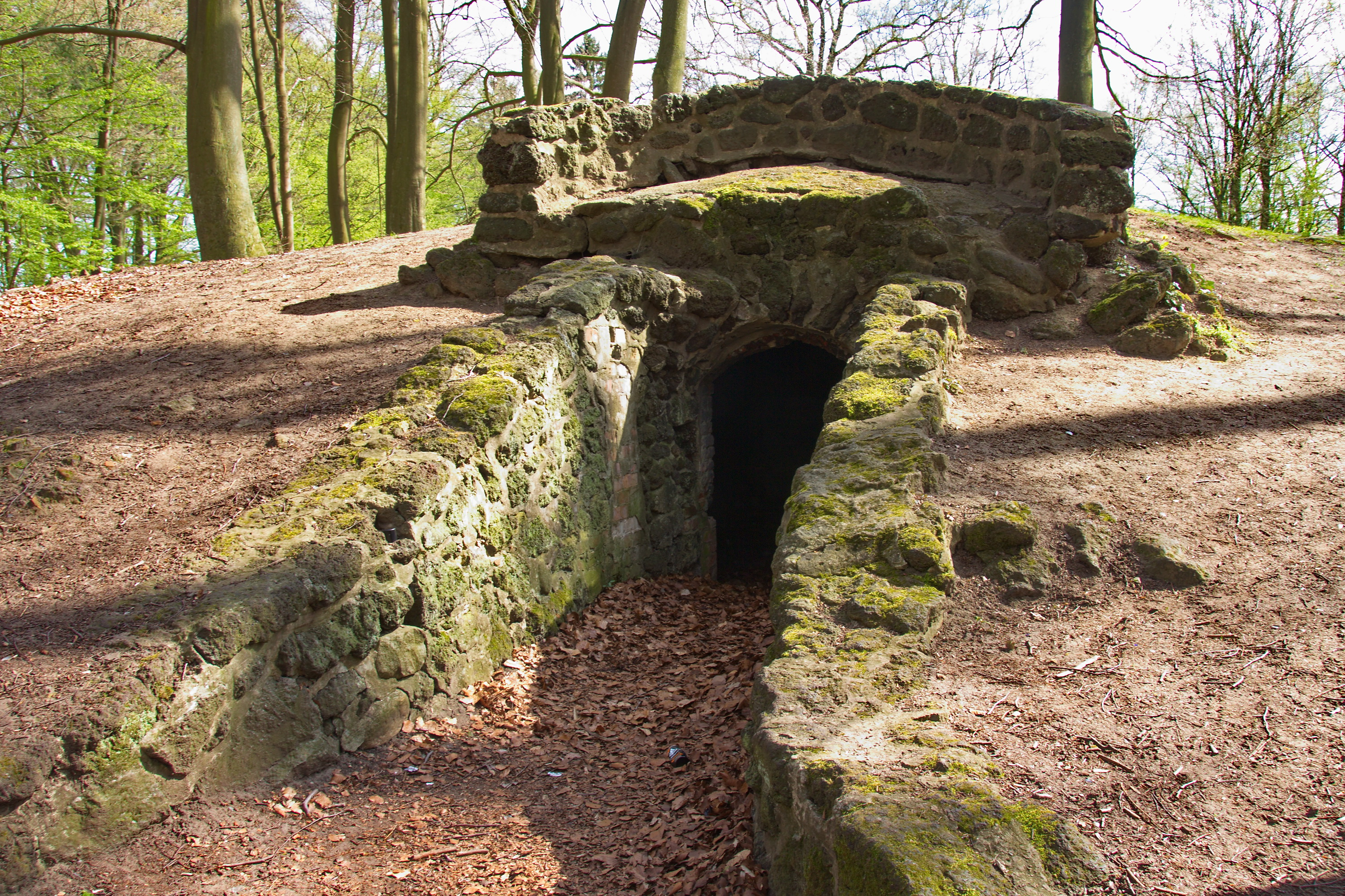 Baudenkmal in Ludwigslust, Mecklenburg-Vorpommern, Deutschland